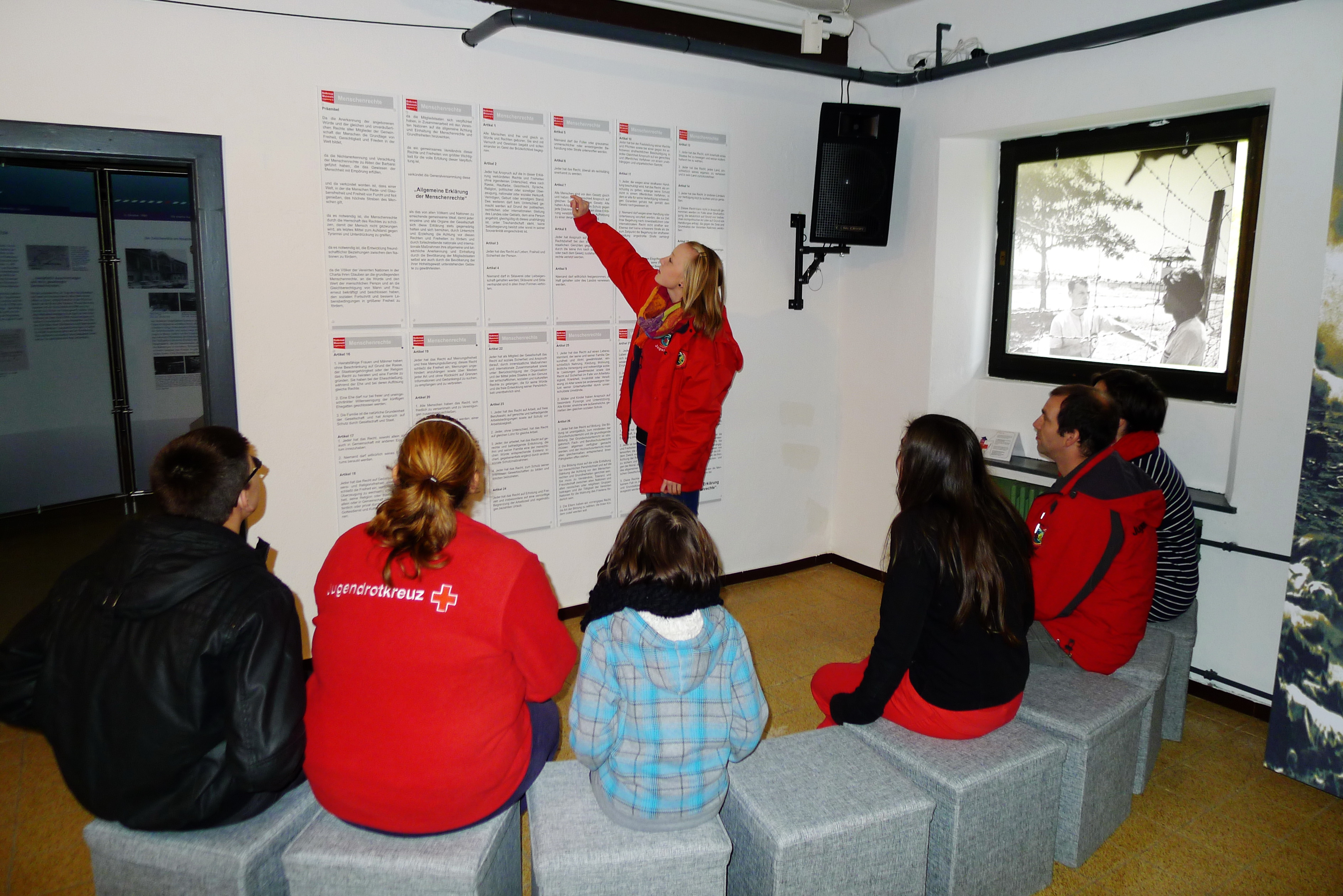 Projektgruppe Rotkreuz Museum vogelsang ip beim präsentieren der Menschenrechtstafelen.